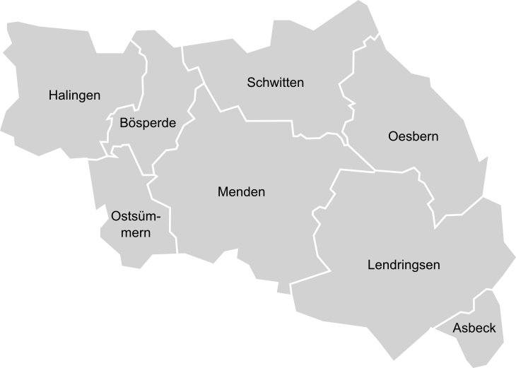 Ortsteile von Menden